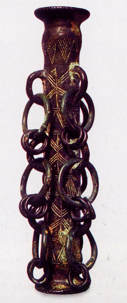 Photo du tintinabulum découvert en 1938 à Boissy aux Cailles et exposé au musée archéologique de Nemours